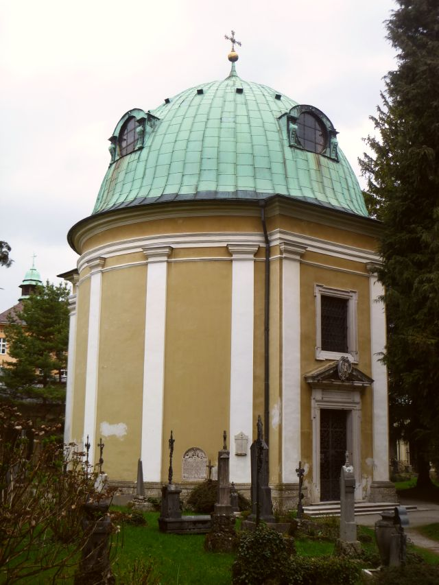 Mausoleum/Gabrielskapelle und Sebastiansfriedhof mit Friedhofsarkaden